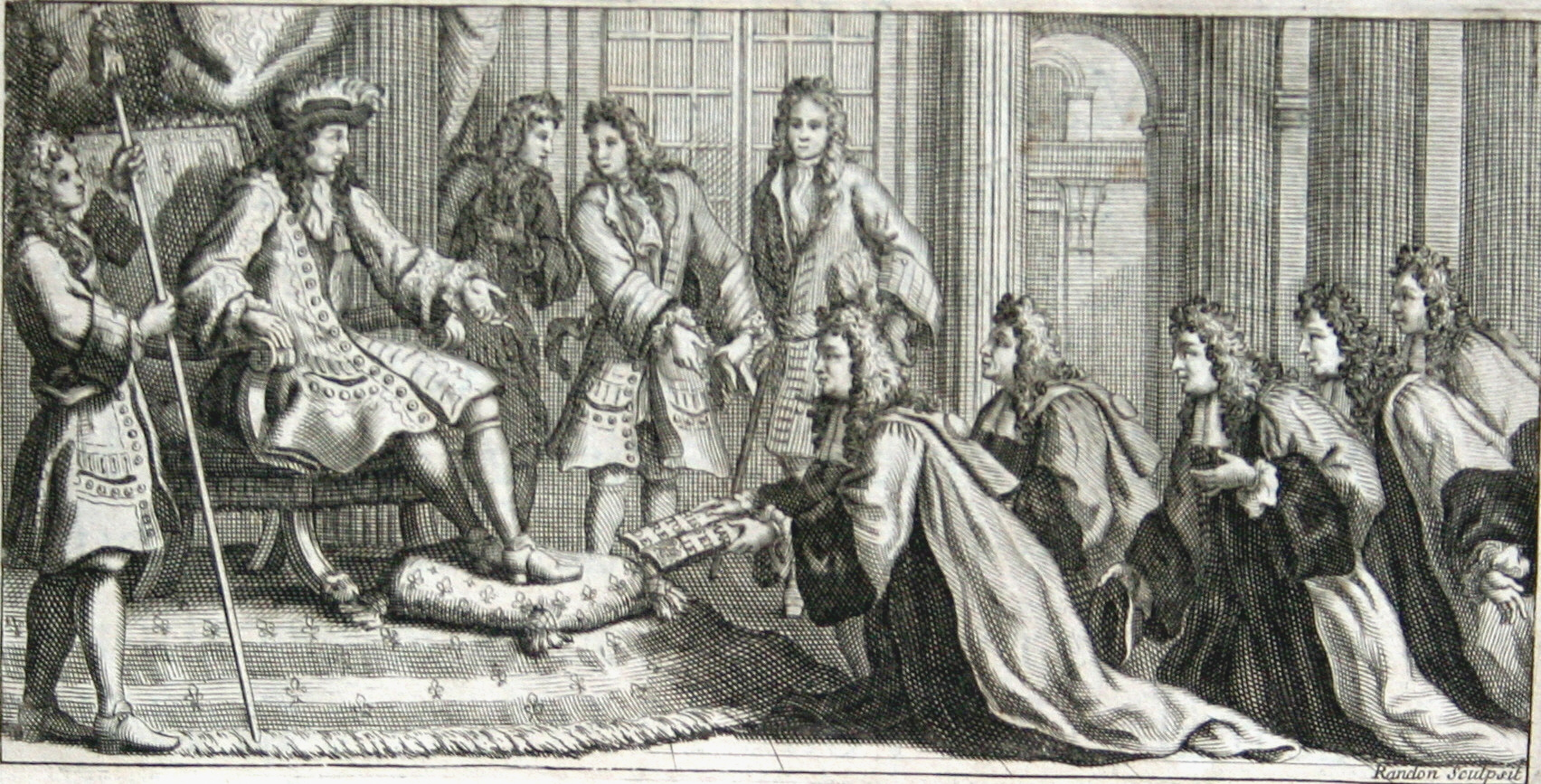 Les échevins de Marseille remettant à Louis XIV l'histoire de Marseille par Ruffi. Gravure du livre édité en 1696.